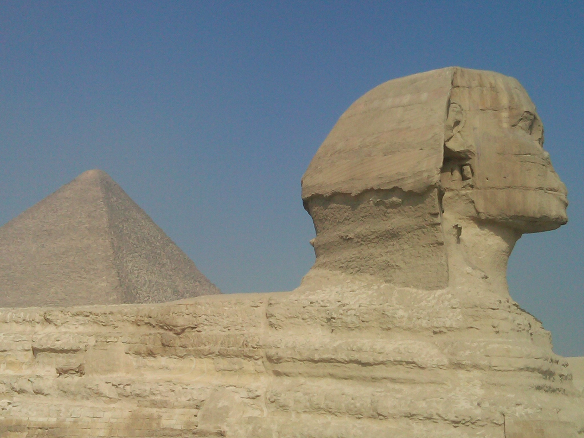 راس ابو الهول